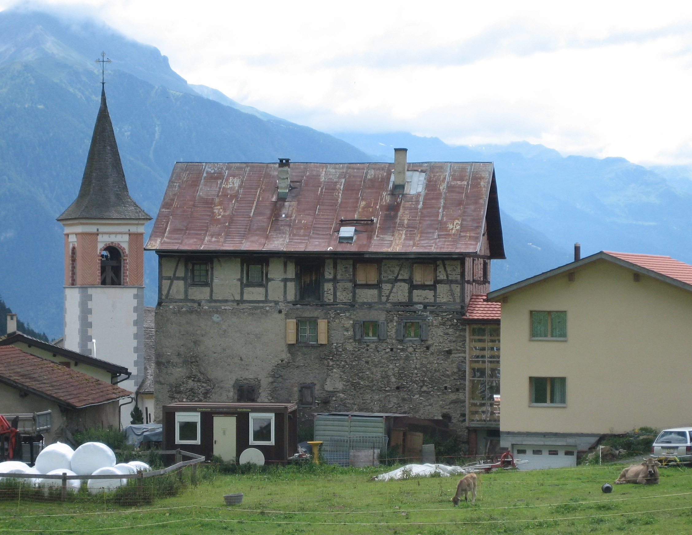 in Lain